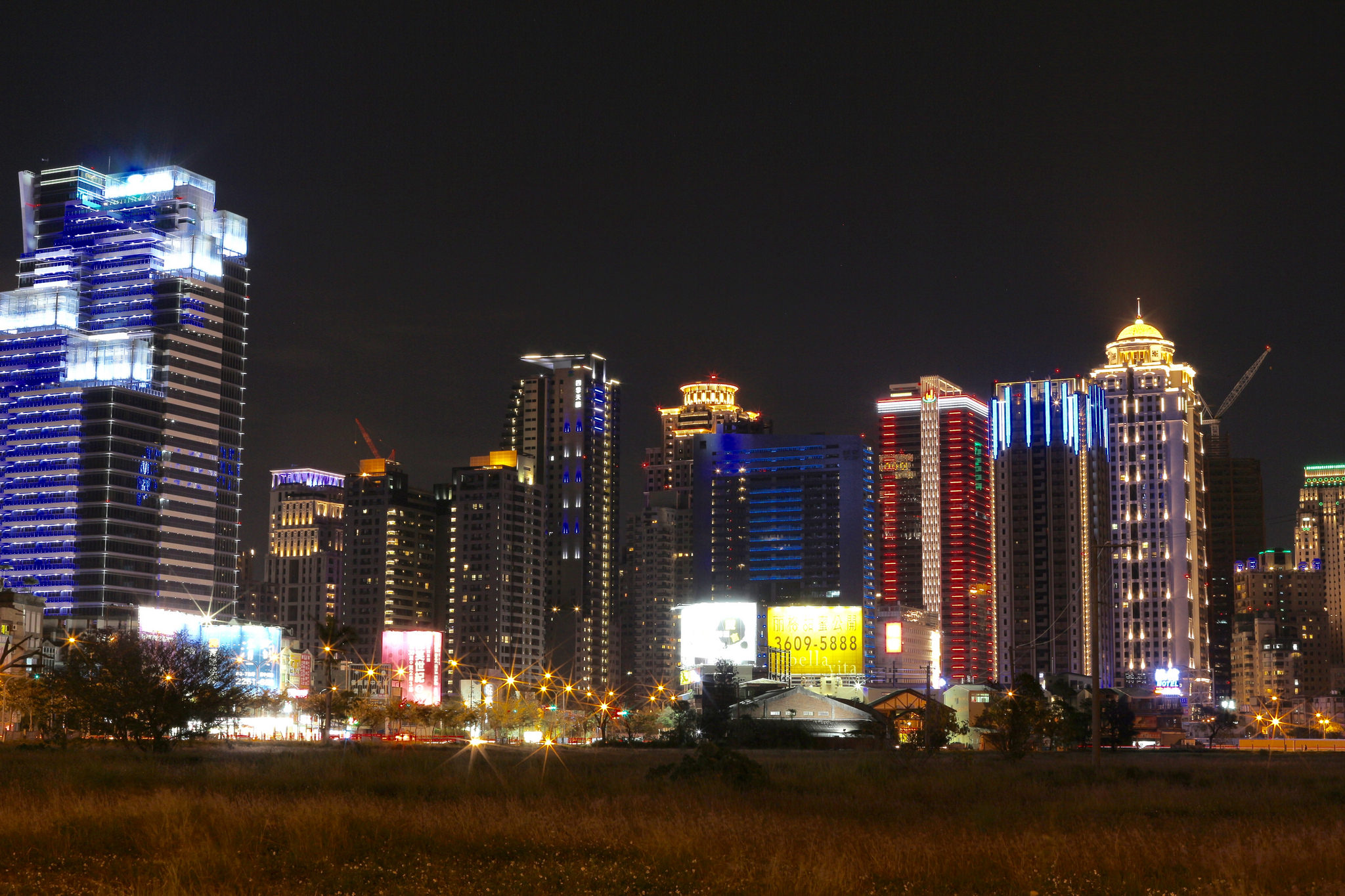 中文（台灣）: 台中七期夜景